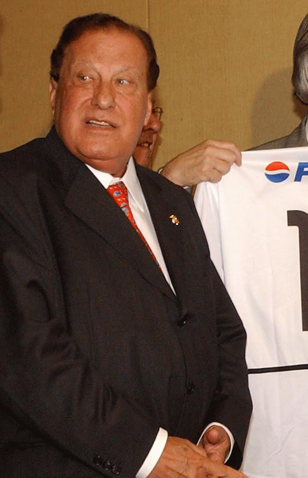 Alberto Dualib e o Presidente Lula